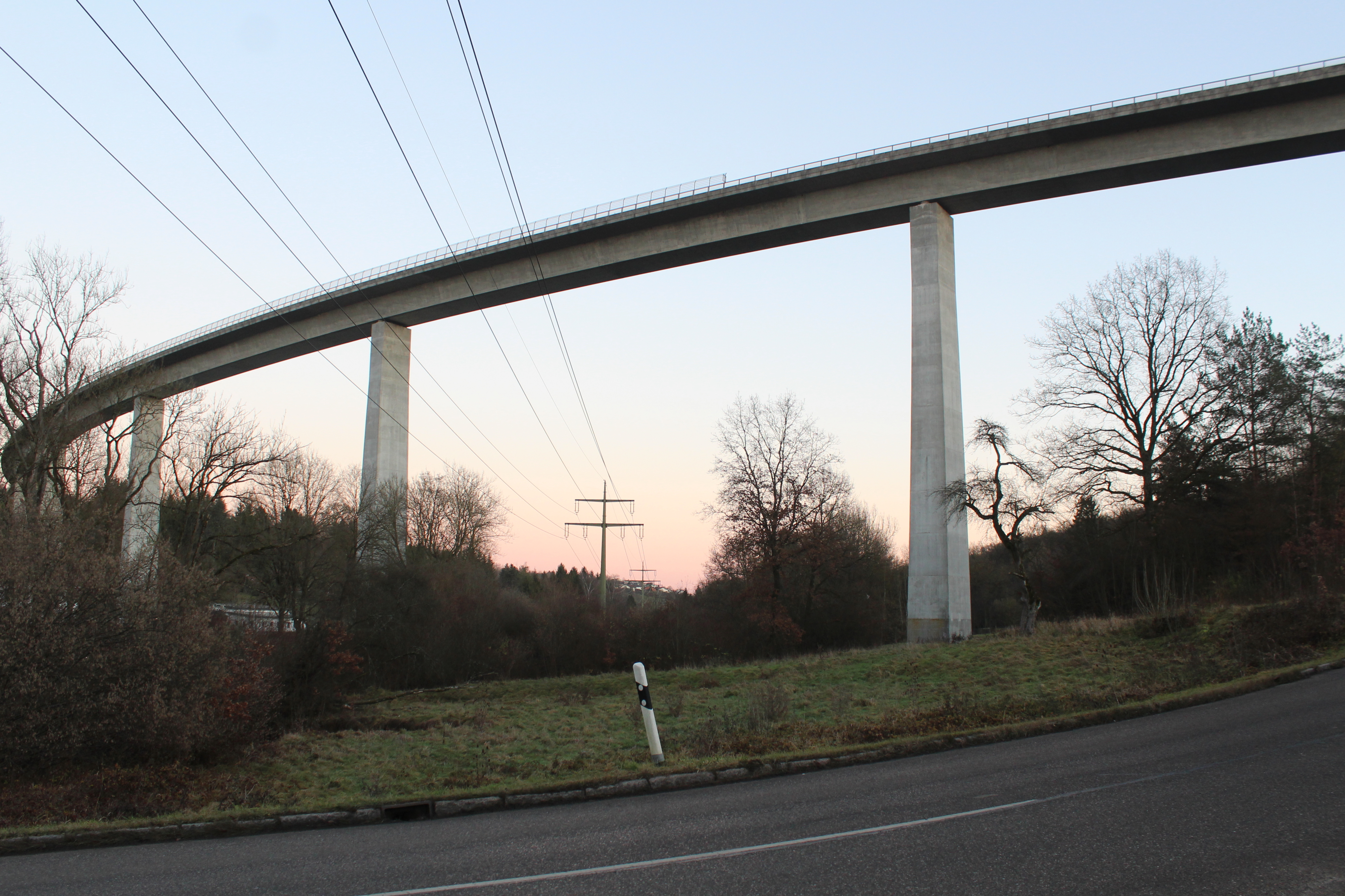 Körschtalviadukt